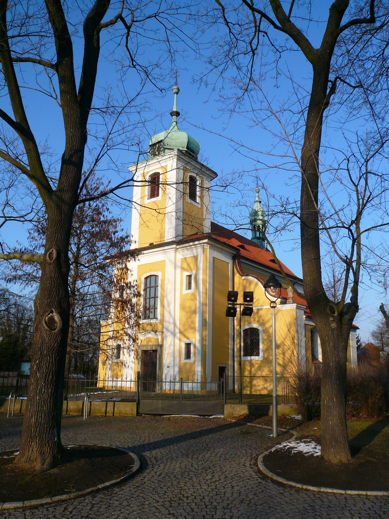 Vinoř, kostel Povýšení Sv. Kříže